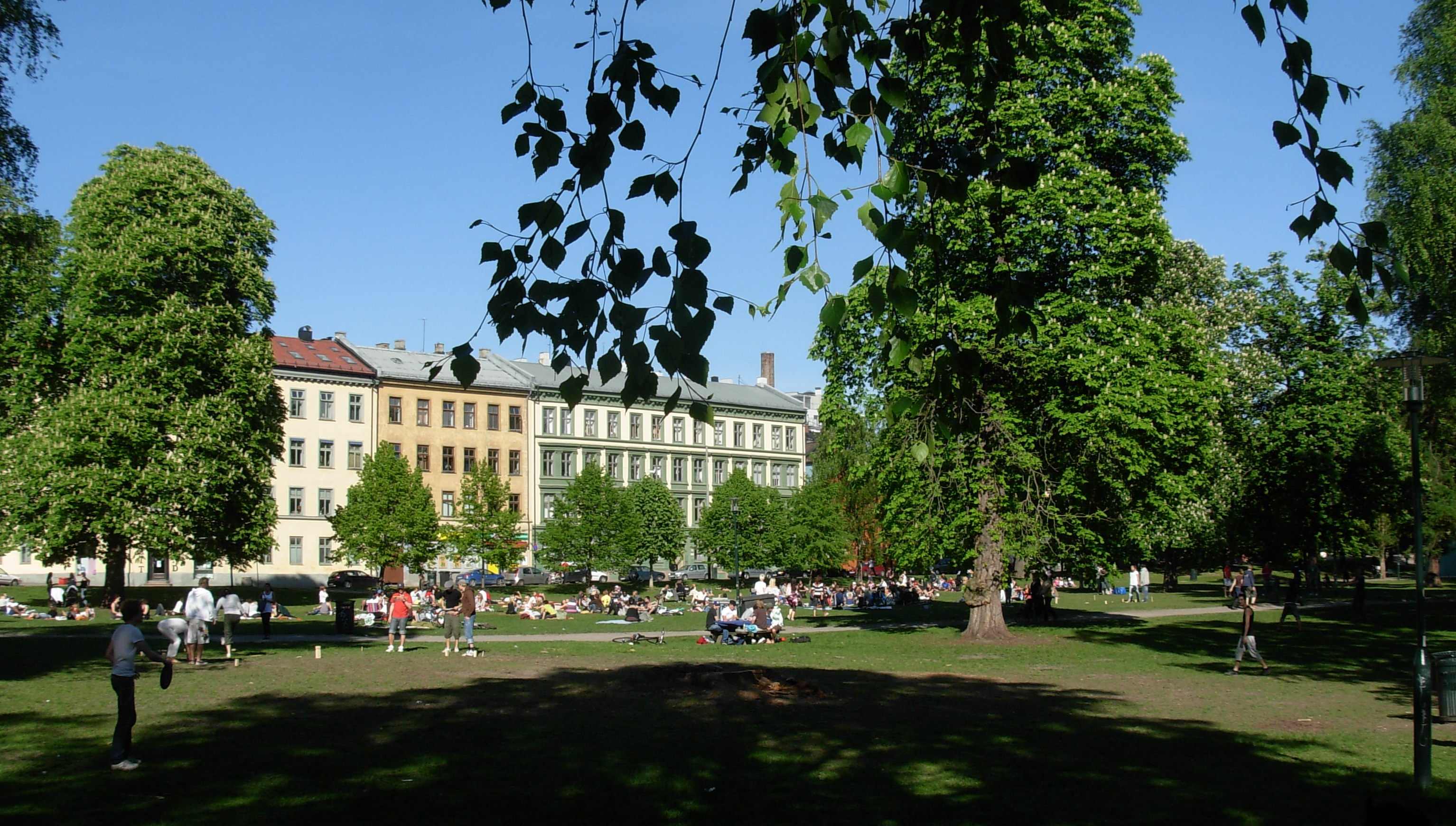 May in Sofienbergparken